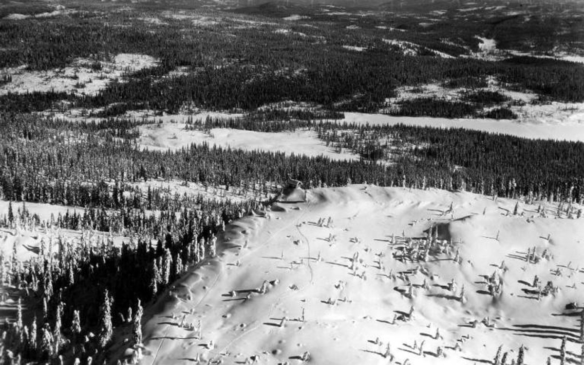 Flyfoto av Gyrihaugen på Krokskogen ved Steinsfjorden.